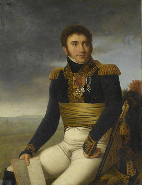 Jean-Marie-Antoine Defrance, général (1771-1835)